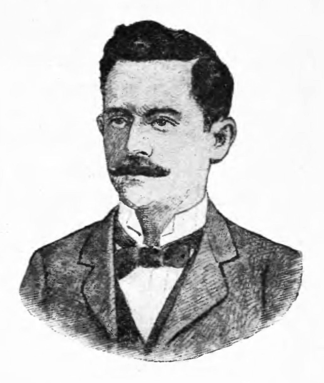 A Patria Brazileira